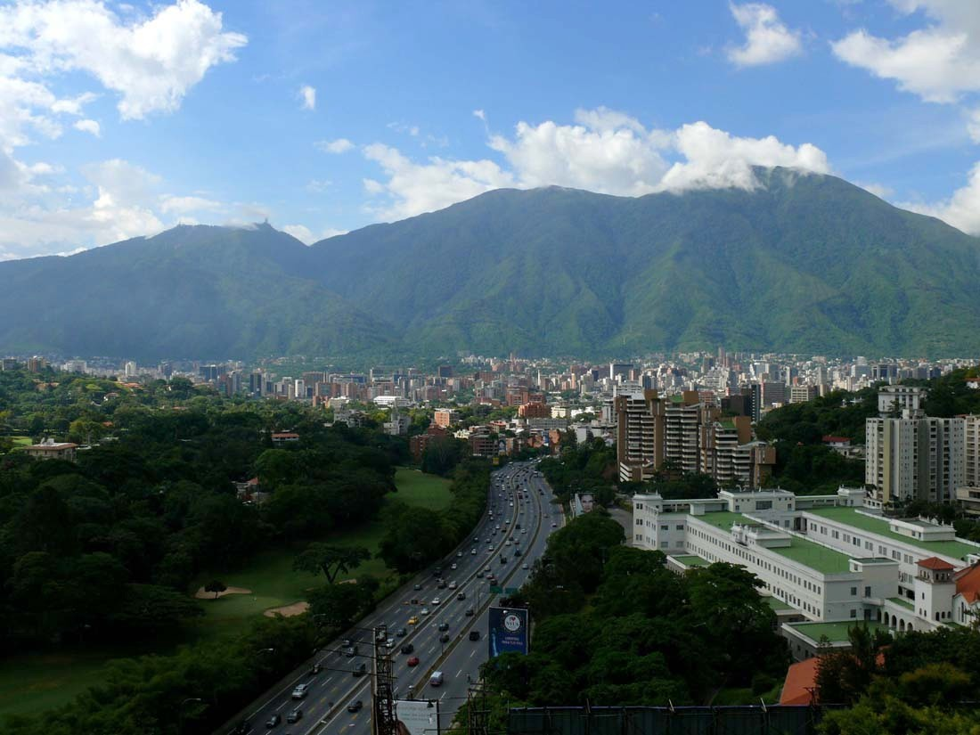 Prados del Este hacia Caracas